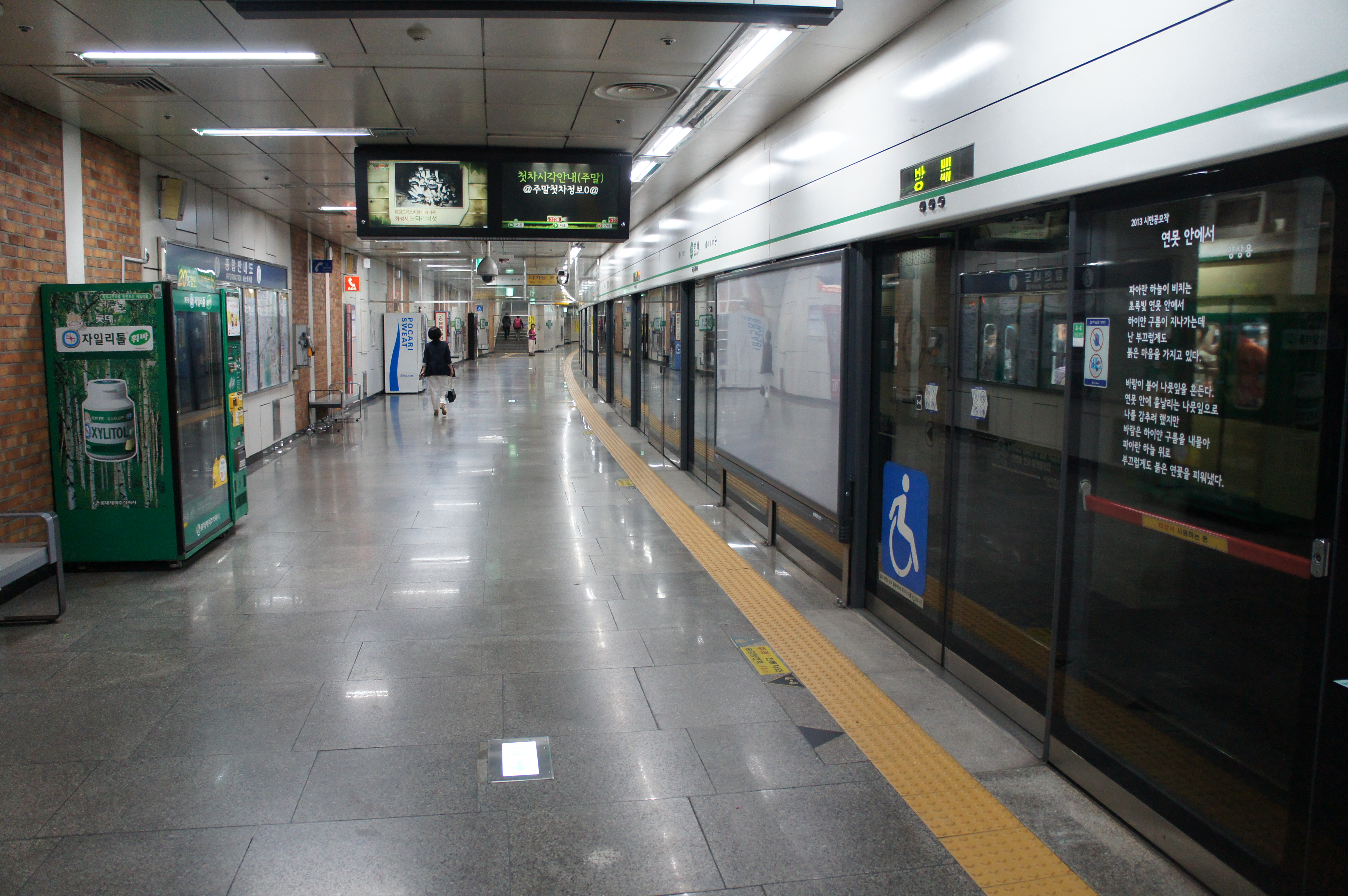 방배역 승강장